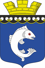 Герб города Суоярви, Карелия, Россия